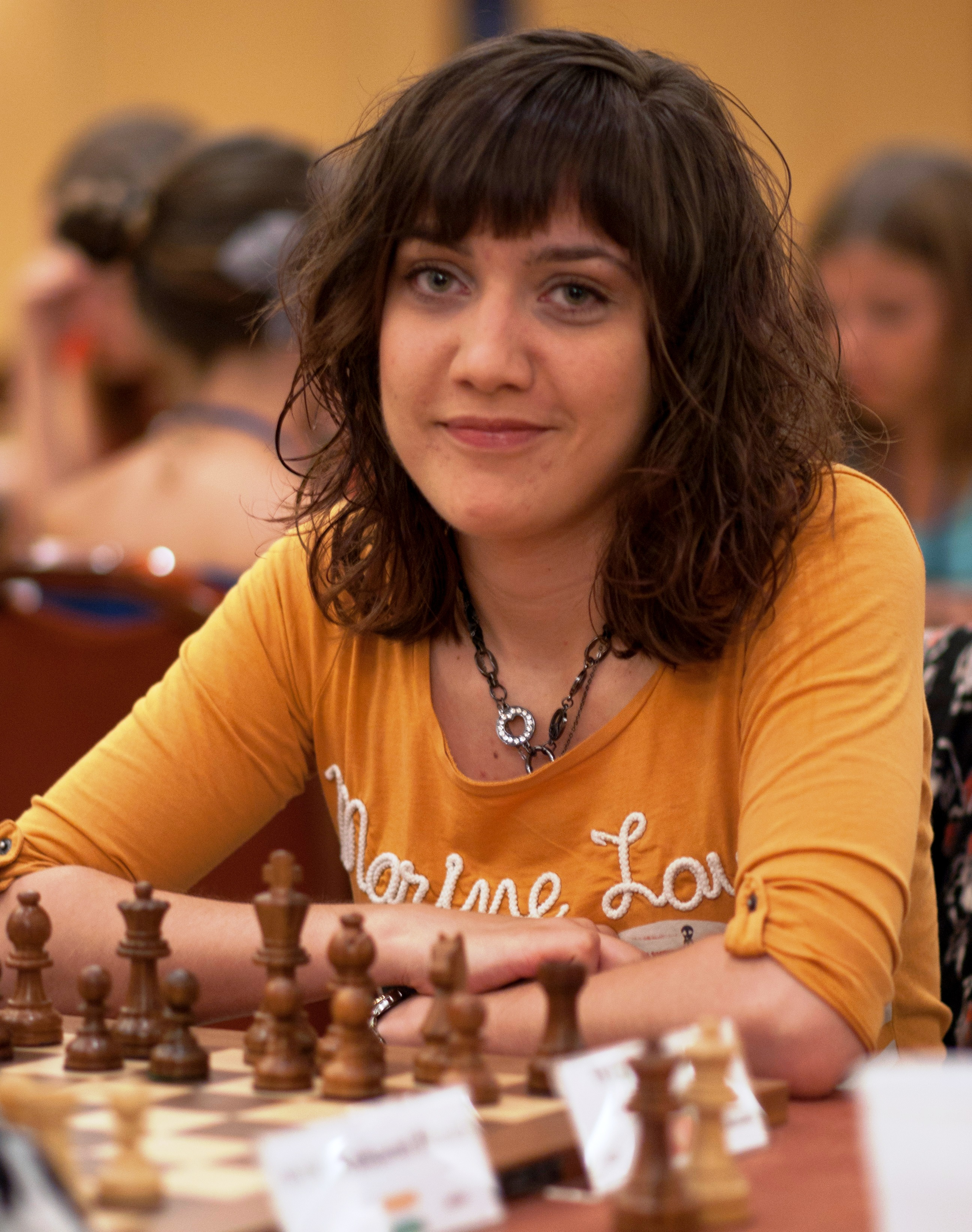 WGM Jovana Vojinovic, WChJ Athens 2012